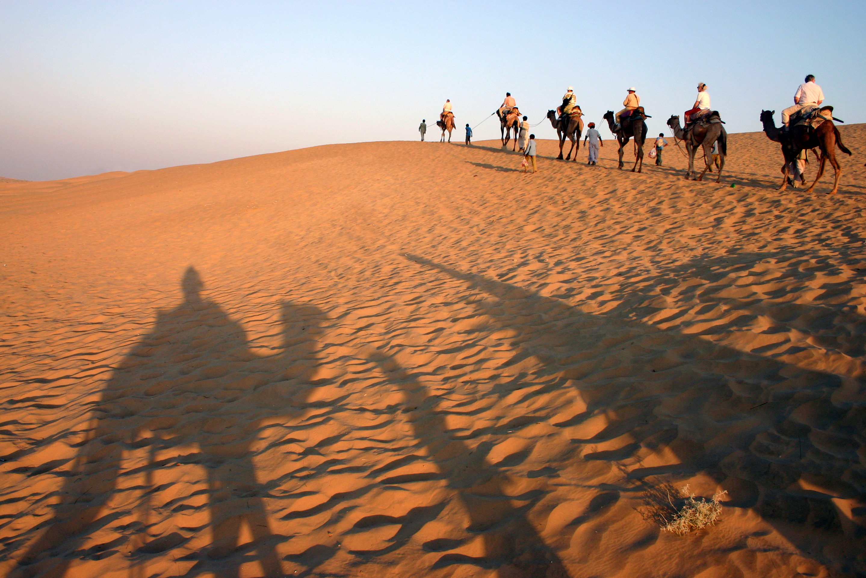 Kamelritt in den Khuri-Sanddünen in der Wüste Thar nahe Jaisalmer / Rajasthan